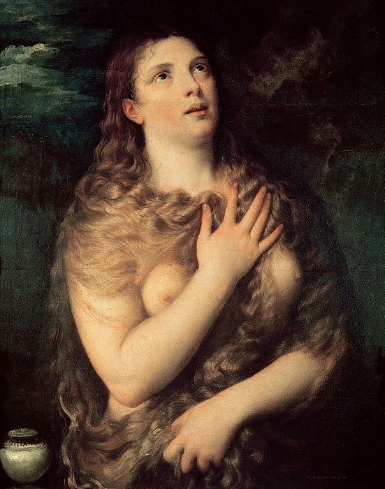 "Кающаяся Мария Магдалина » Начало 1530-х Дерево, масло. 84X69 Флоренция, палаццо Питти, Палатинская галерея